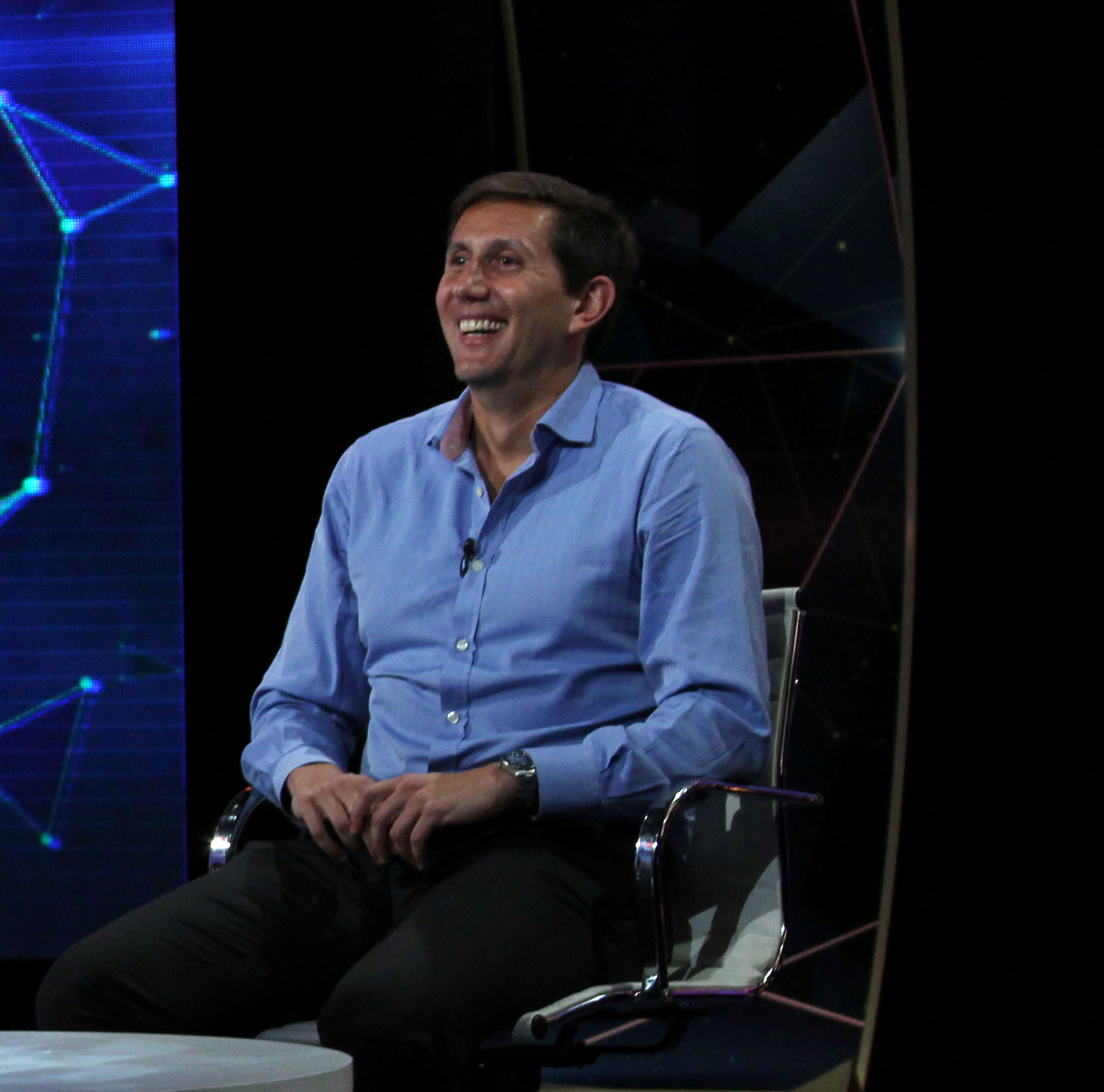 Matías Martin y Juan Pablo Varsky en Línea de tiempo. 18.11.2014. Foto TVP 2014